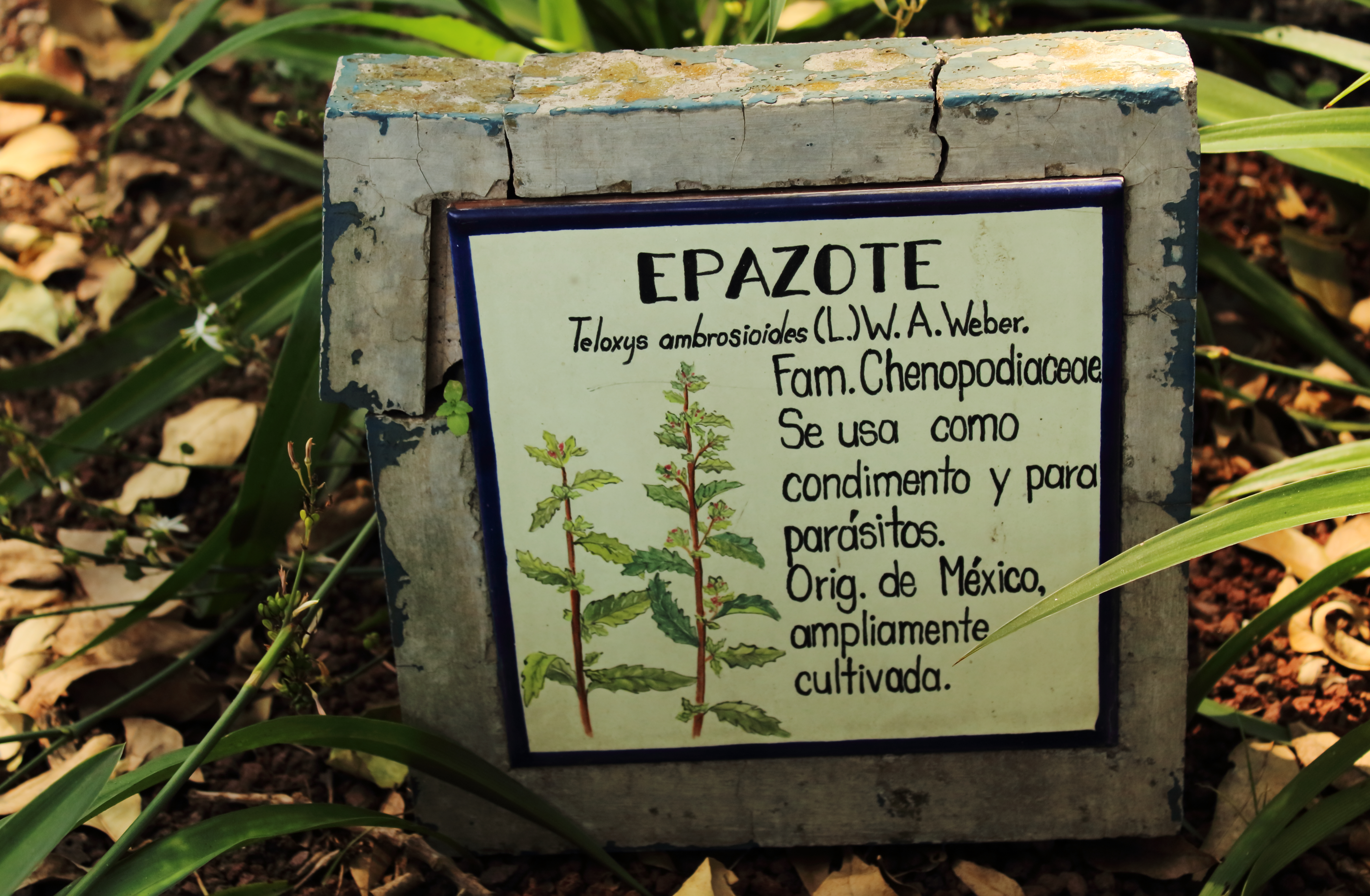 Breve descripción sobre Dysphania ambrosioides syn. Teloxys ambrosioides en el jardín botánico de la UNAM, México.